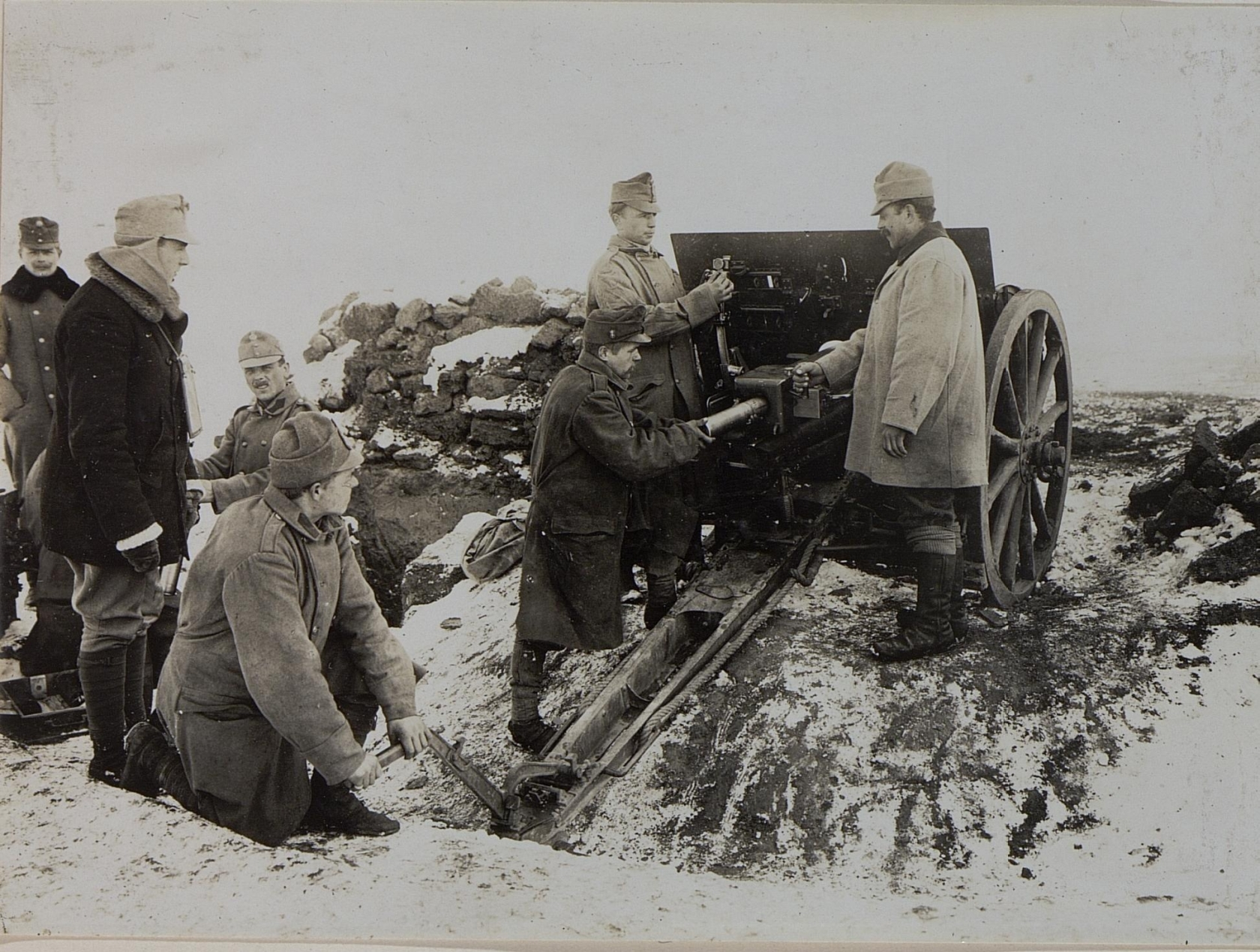 9 cm Feldkanonen Regiment 30/2 in Kotolistrika.